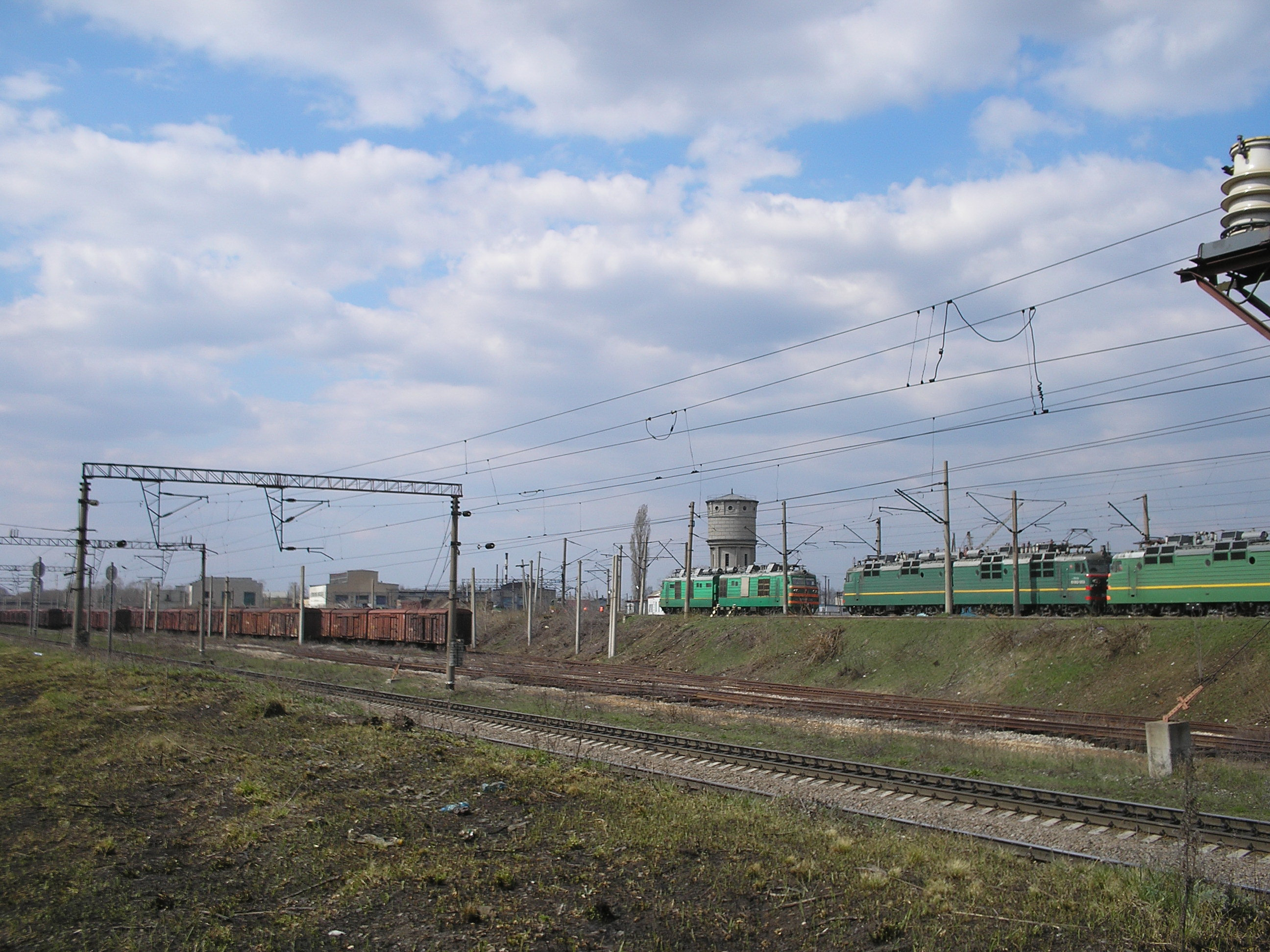 Ртищево. Локомотивное депо. Электровозы на перегоне между депо и станцией Ртищево-2